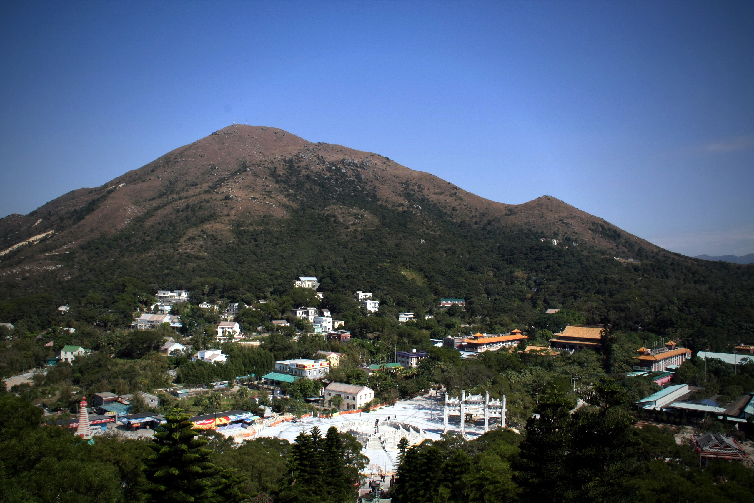 Ngong Ping 昂坪